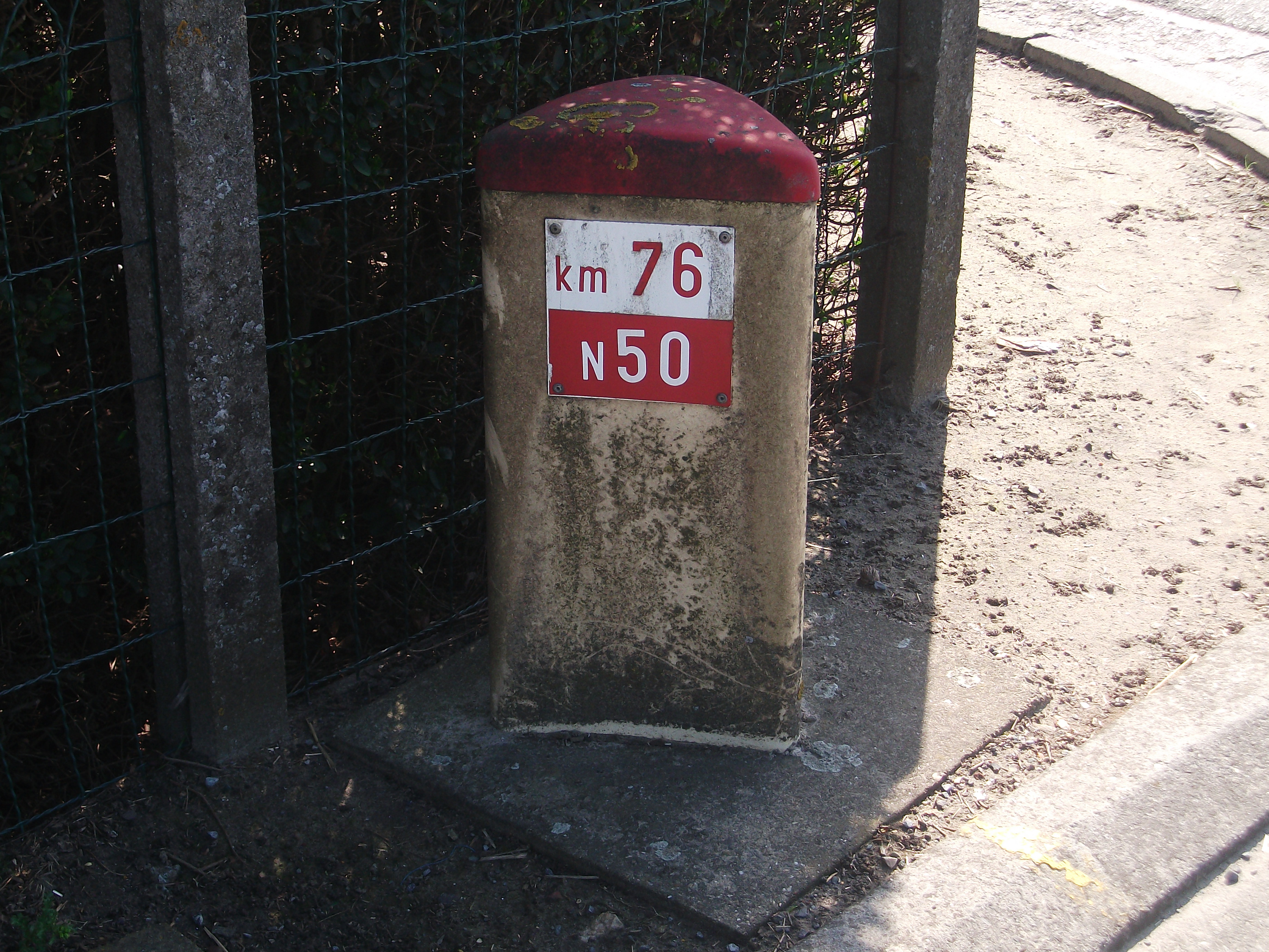 West-Vlams: Kilometerpoale van den N50 gewestboane in 't Veld (Mullebeke).